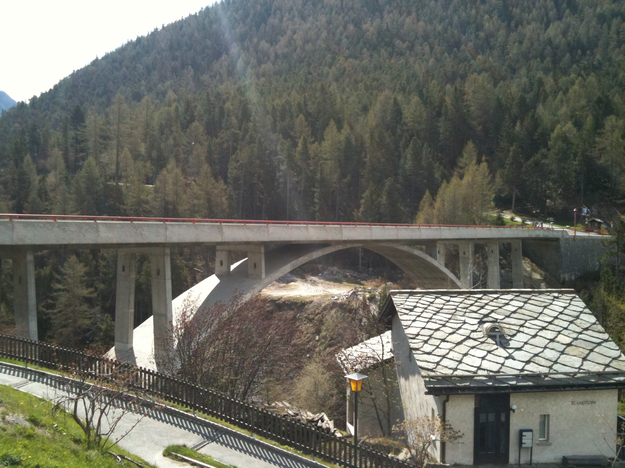 Panoramabrücke in Saas-Fee, Kanton Wallis